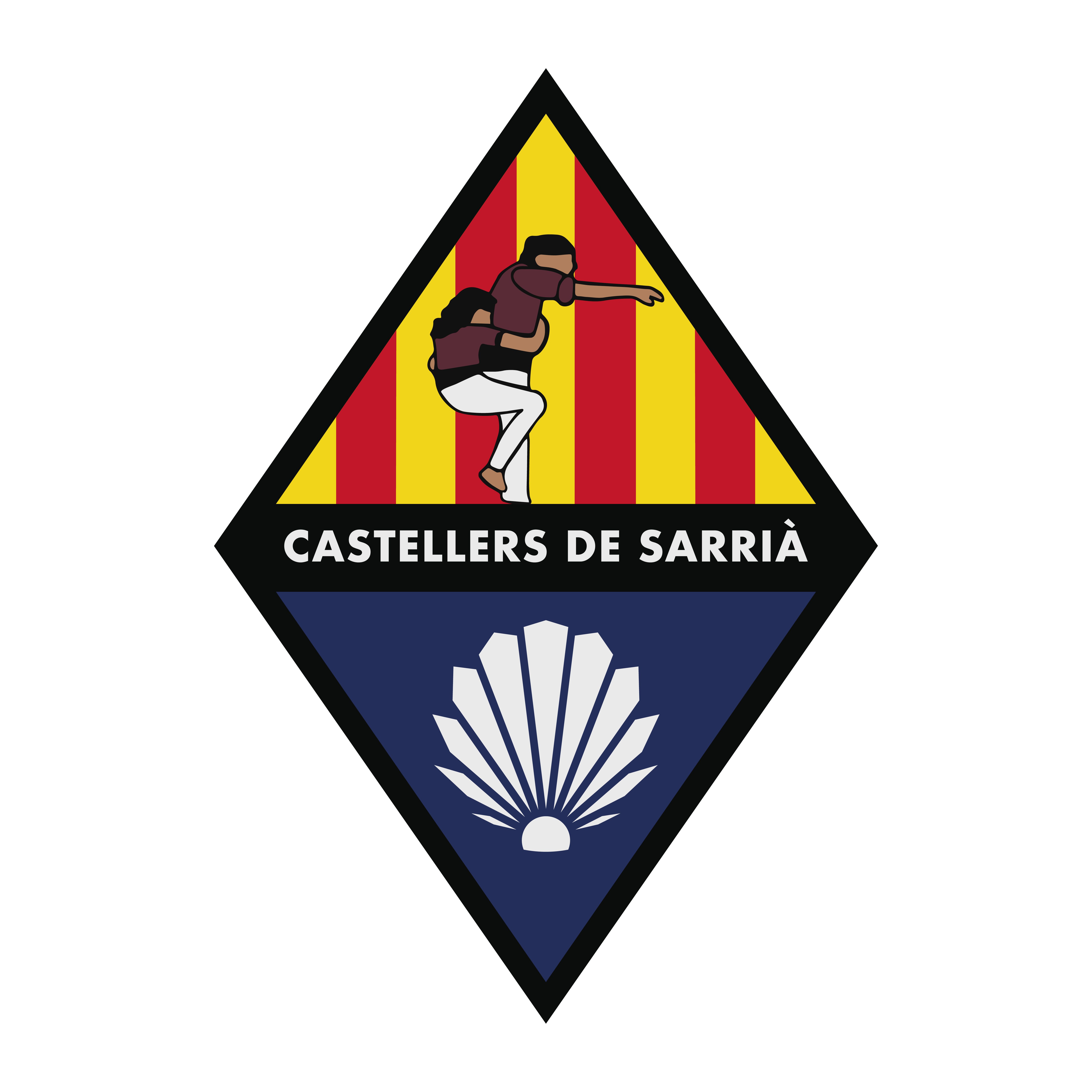 Escut dels Castellers de Sarrià